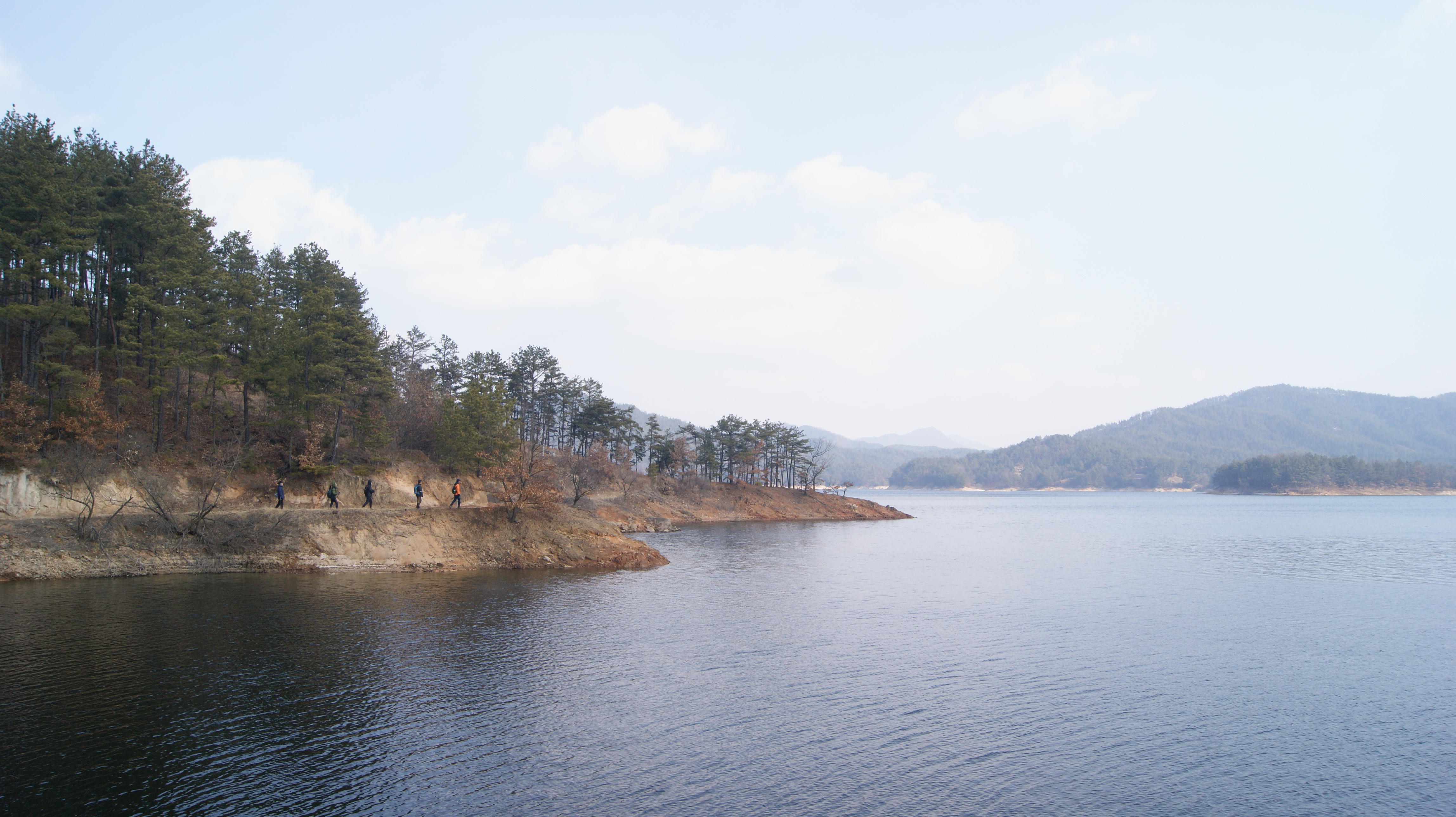 대청호오백리길 3구간_5